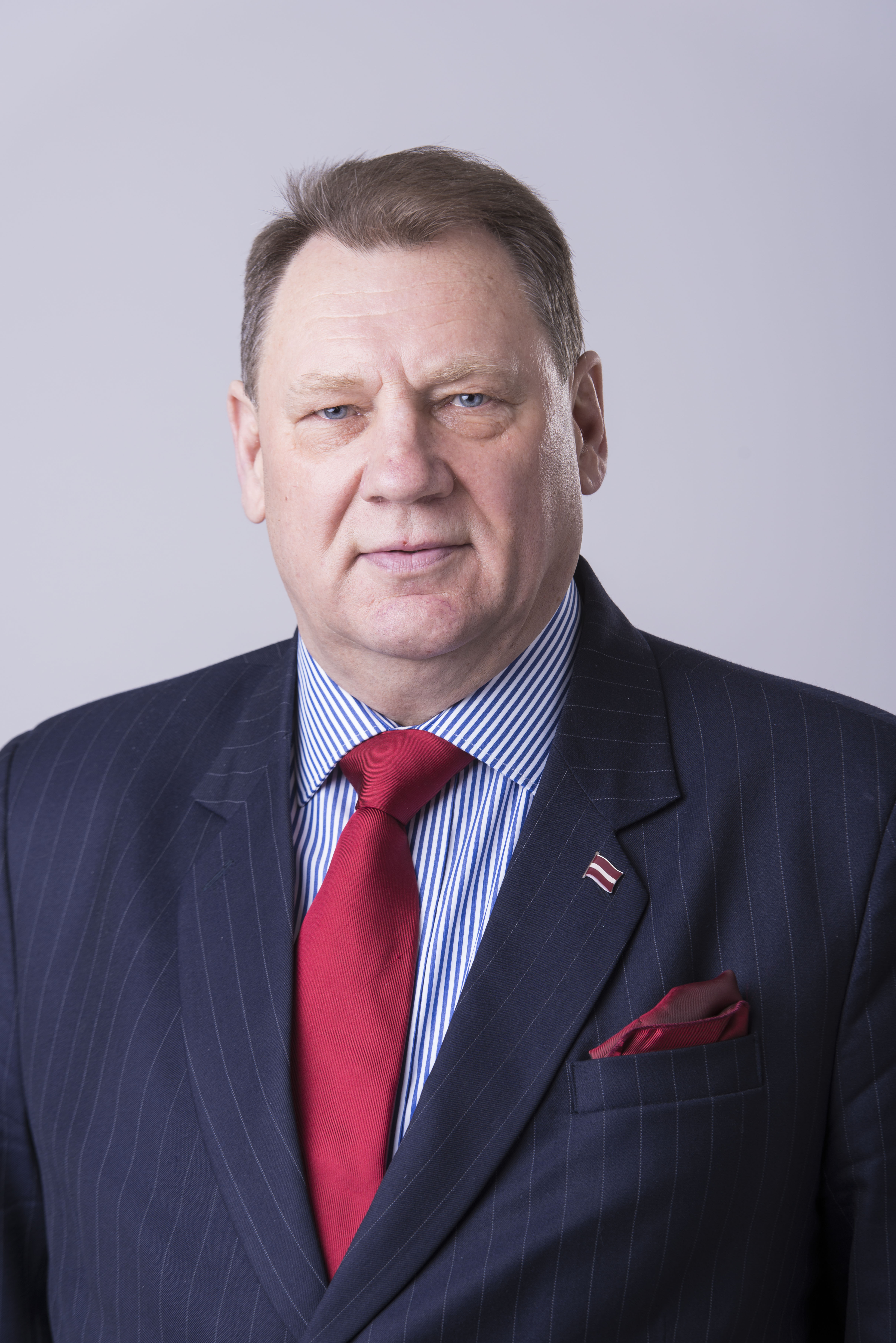 2014.gada 9.decembris. 12.Saeimas deputāts Juris Vectirāns. Foto: Reinis Inkēns, Saeimas Kanceleja Izmantošanas noteikumi: saeima.lv/lv/autortiesibas